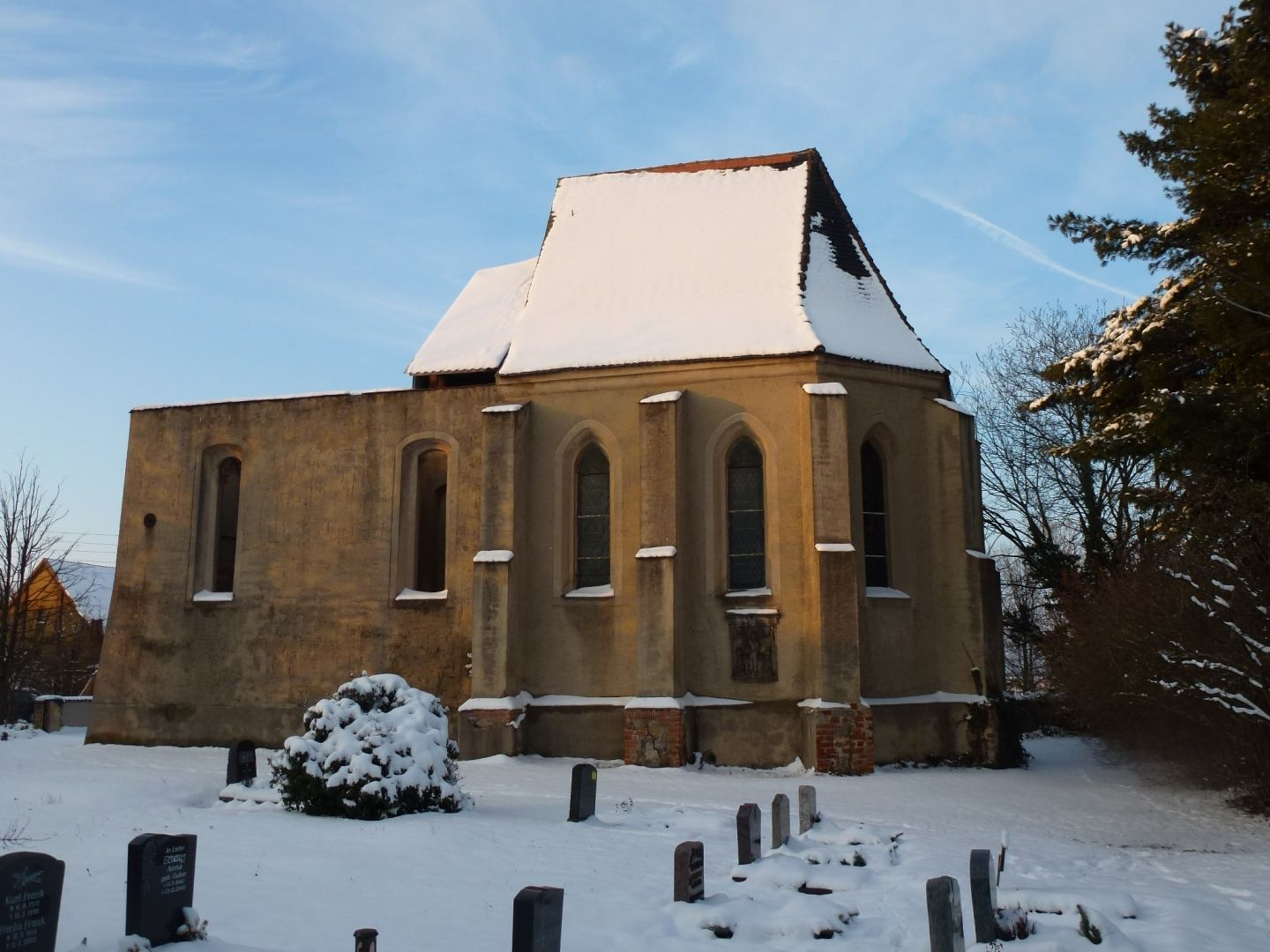 Teilweise zerstörte Kirche in Gerbisdorf